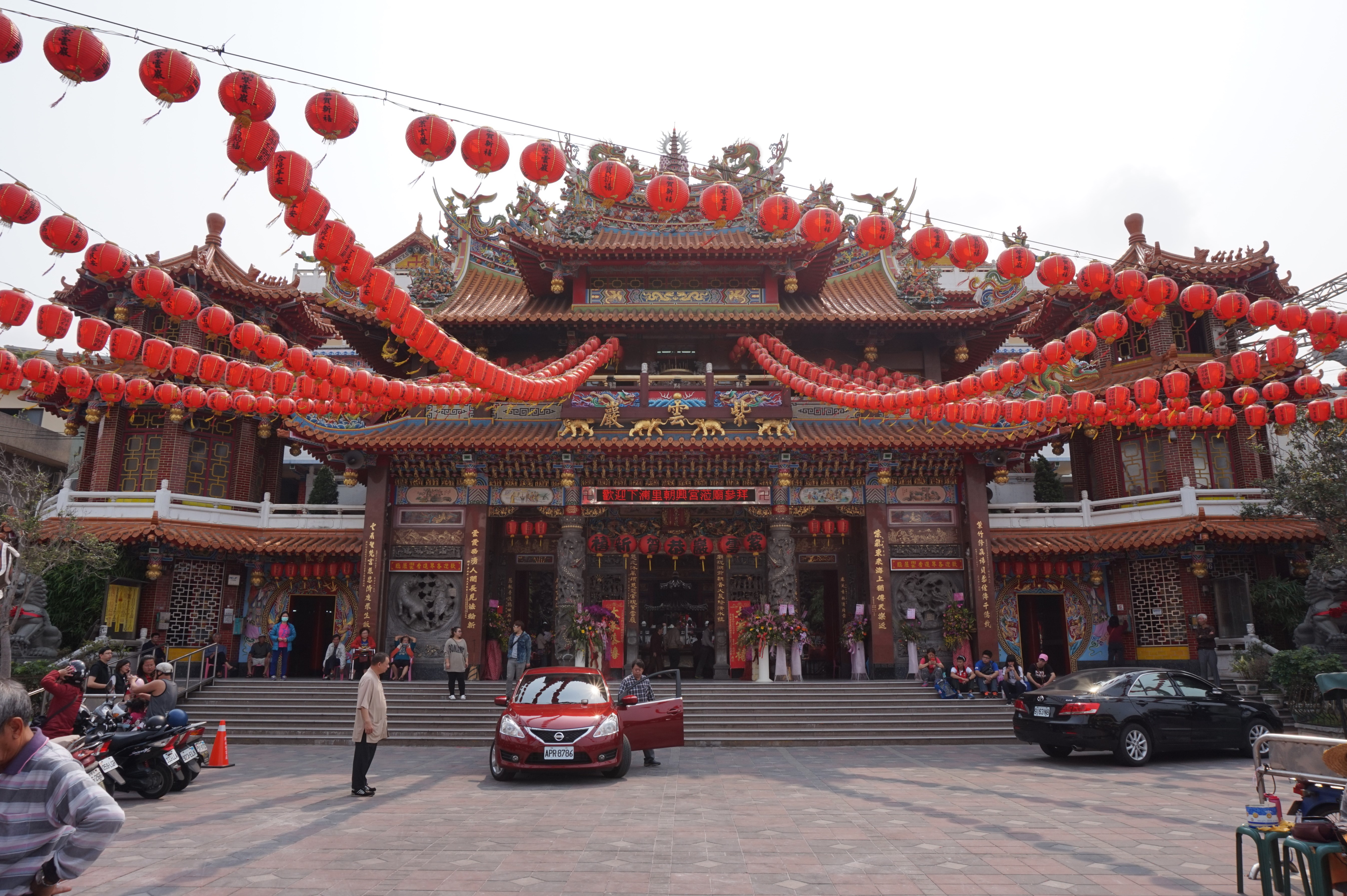 中文（台灣）: 臺灣臺中市清水區大街路206號